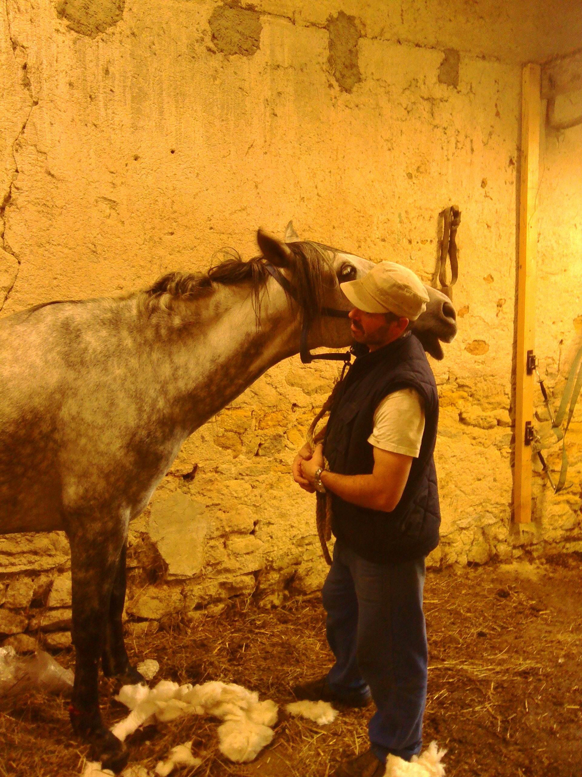 Une jument lusitanienne de 7 ans s'appuyant sur son palefrenier pendant qu'elle est anesthésiée pour des soins vétérinaires. Photo prise en Auvergne.